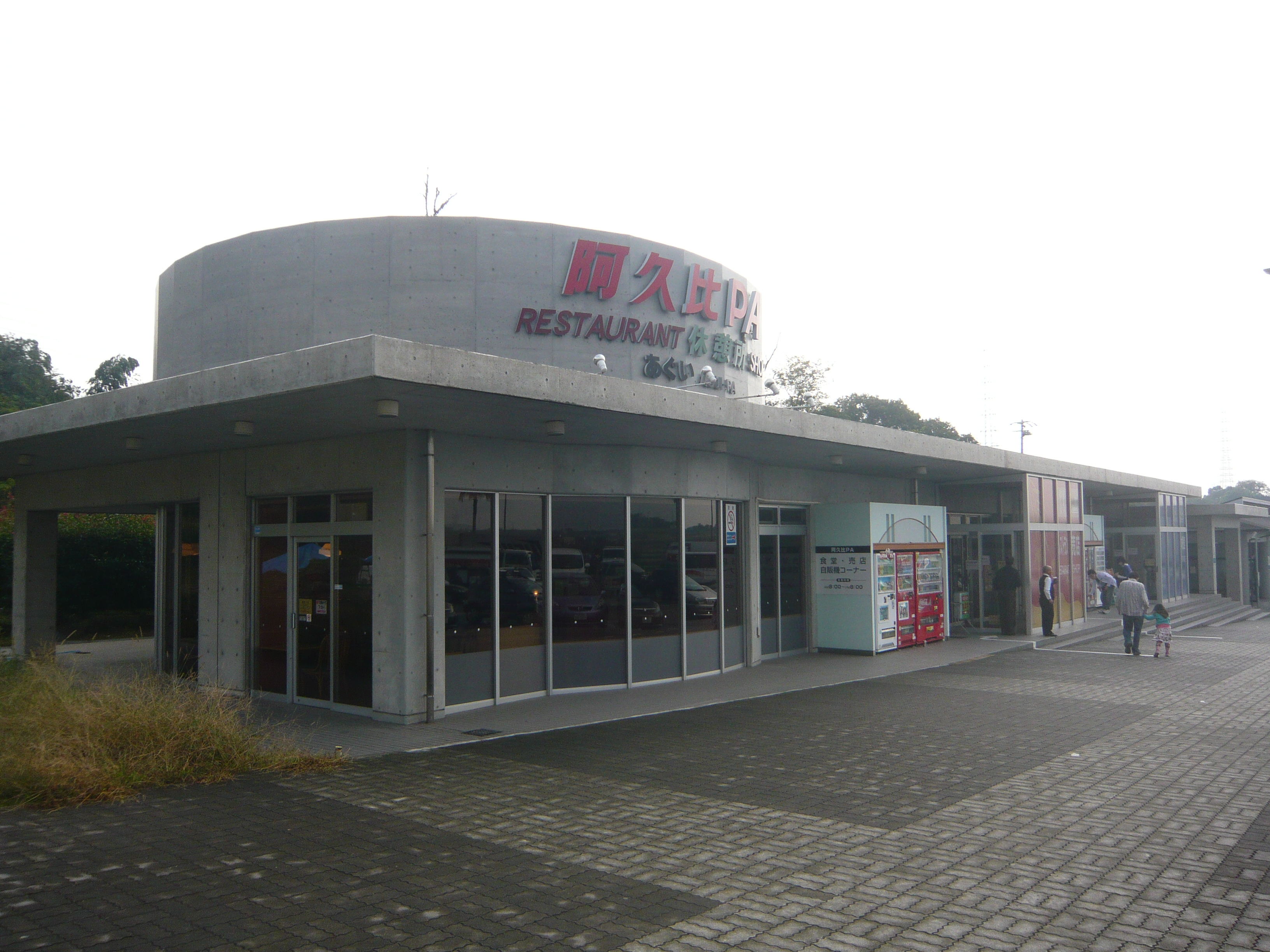 Agui PA（阿久比パーキングエリア）,Taketoyo,Aichi（愛知県知多郡阿久比町）で撮影。